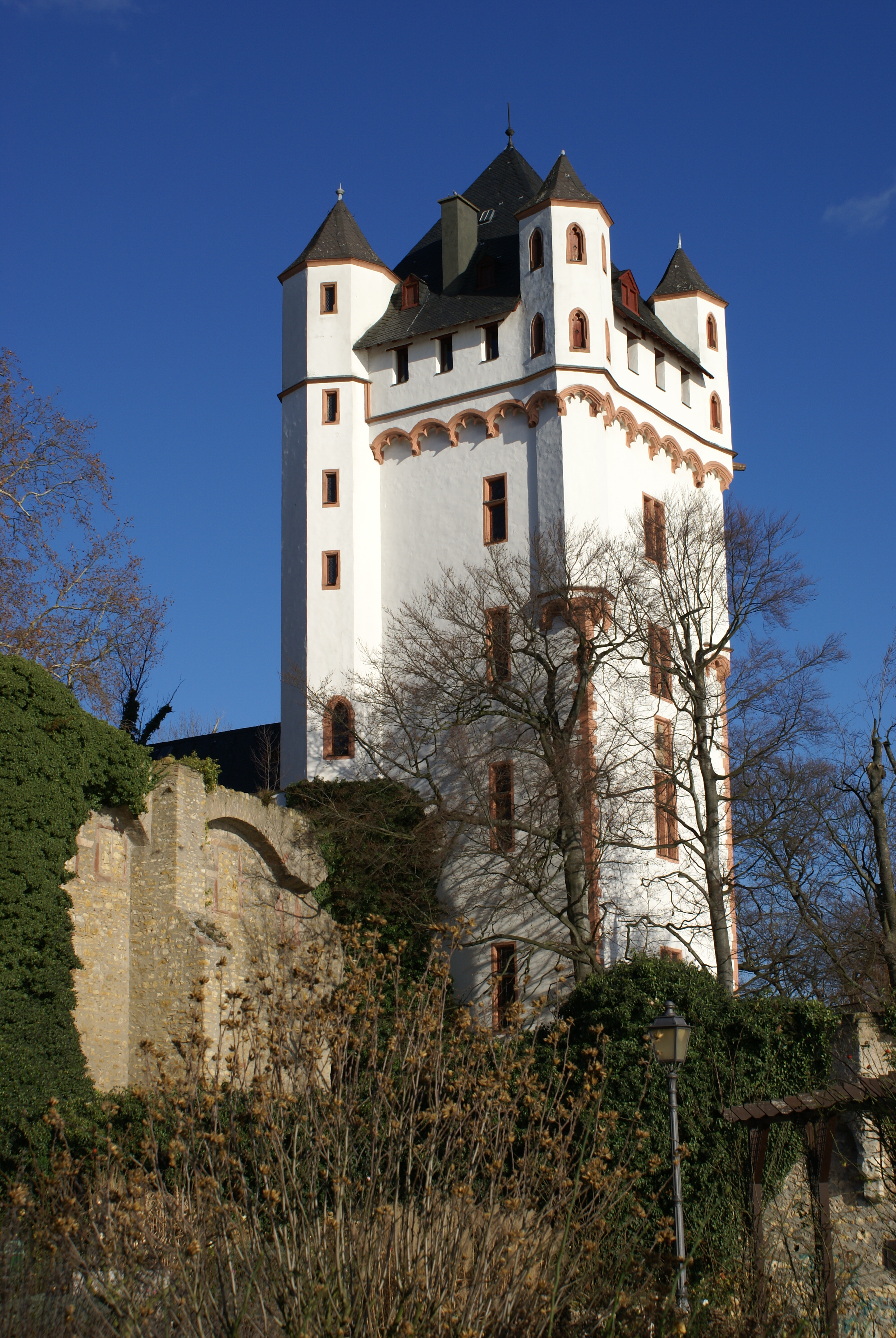 Kurfürstliche Burg